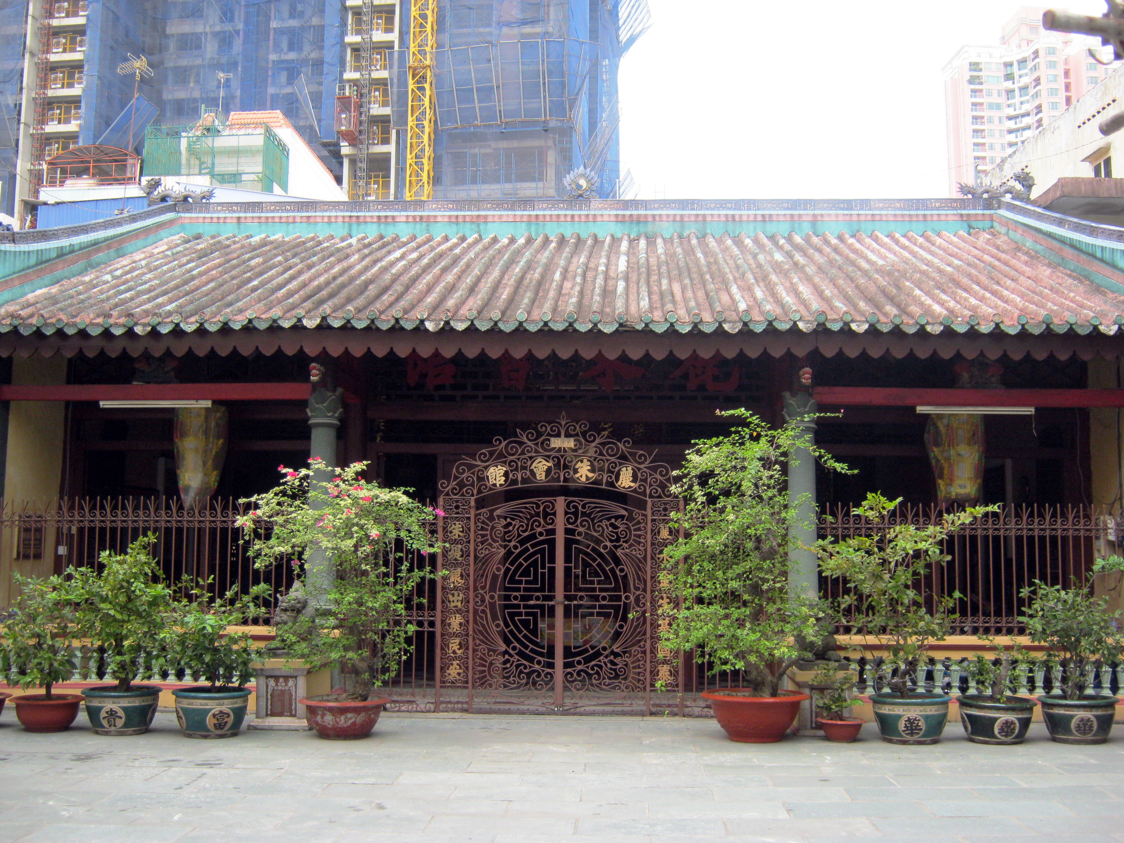 Hội quán Lệ Châu tọa lạc tại số 586 đường Trần Hưng Đạo, thuộc phường 14, quận 5, Thành phố Hồ Chí Minh. Đây là nhà thờ tổ nghề thợ kim hoàn sớm nhất tại vùng đất này.